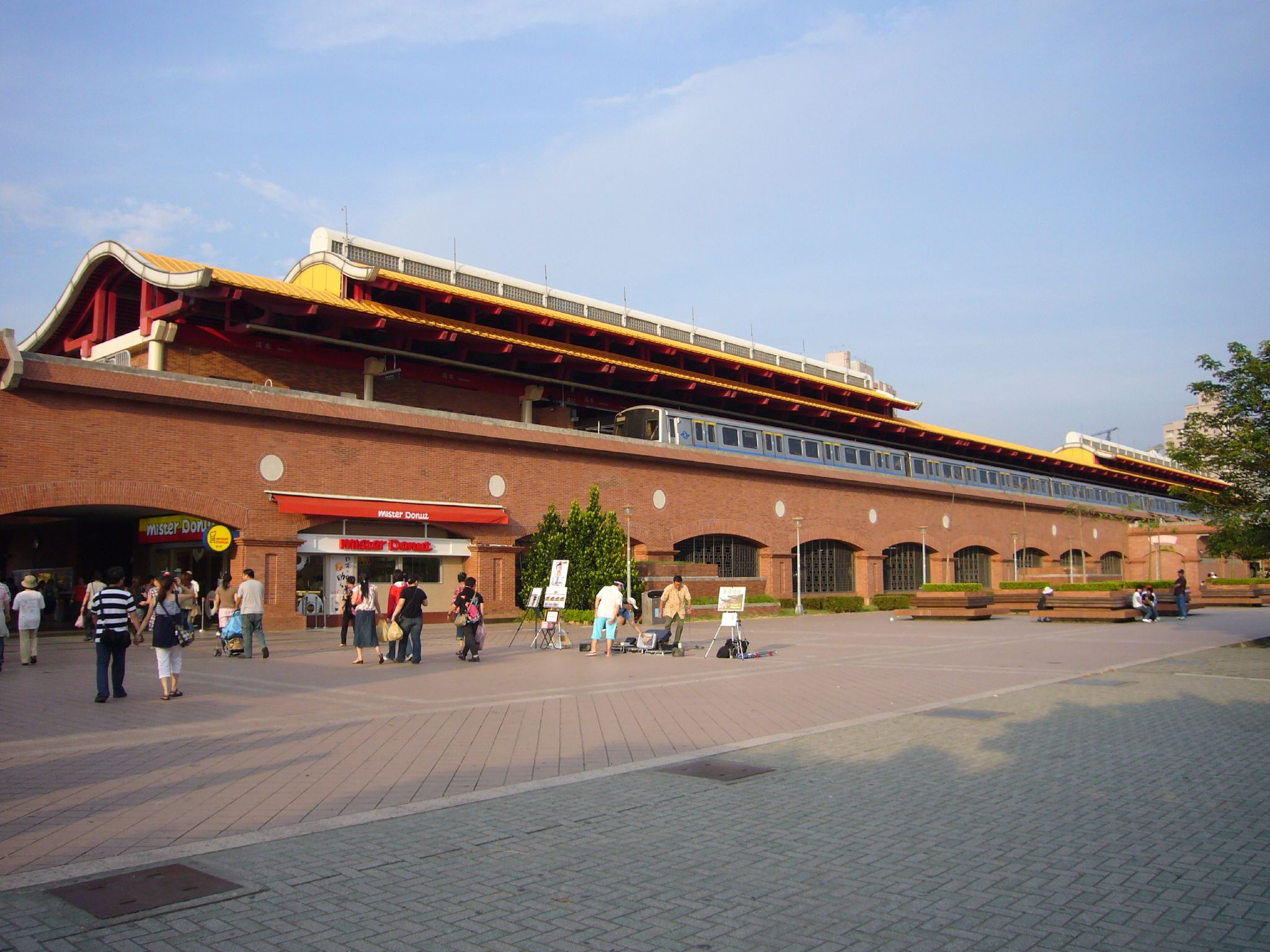 臺北捷運淡水站。